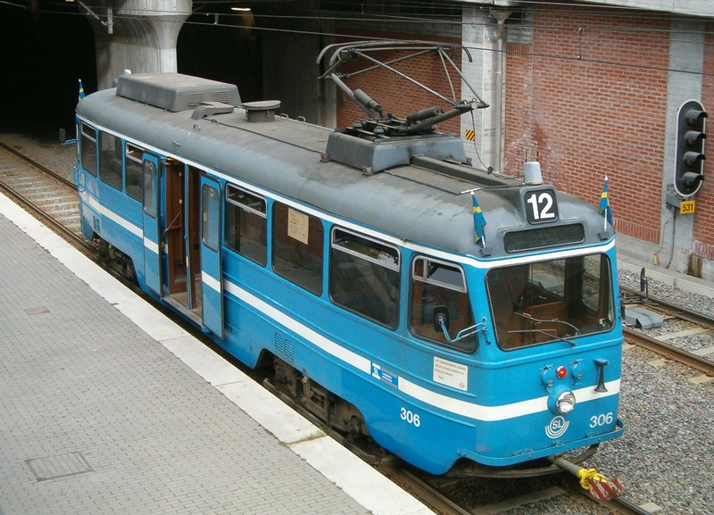 A30 306 från Nockebybanan i Alvik 2004